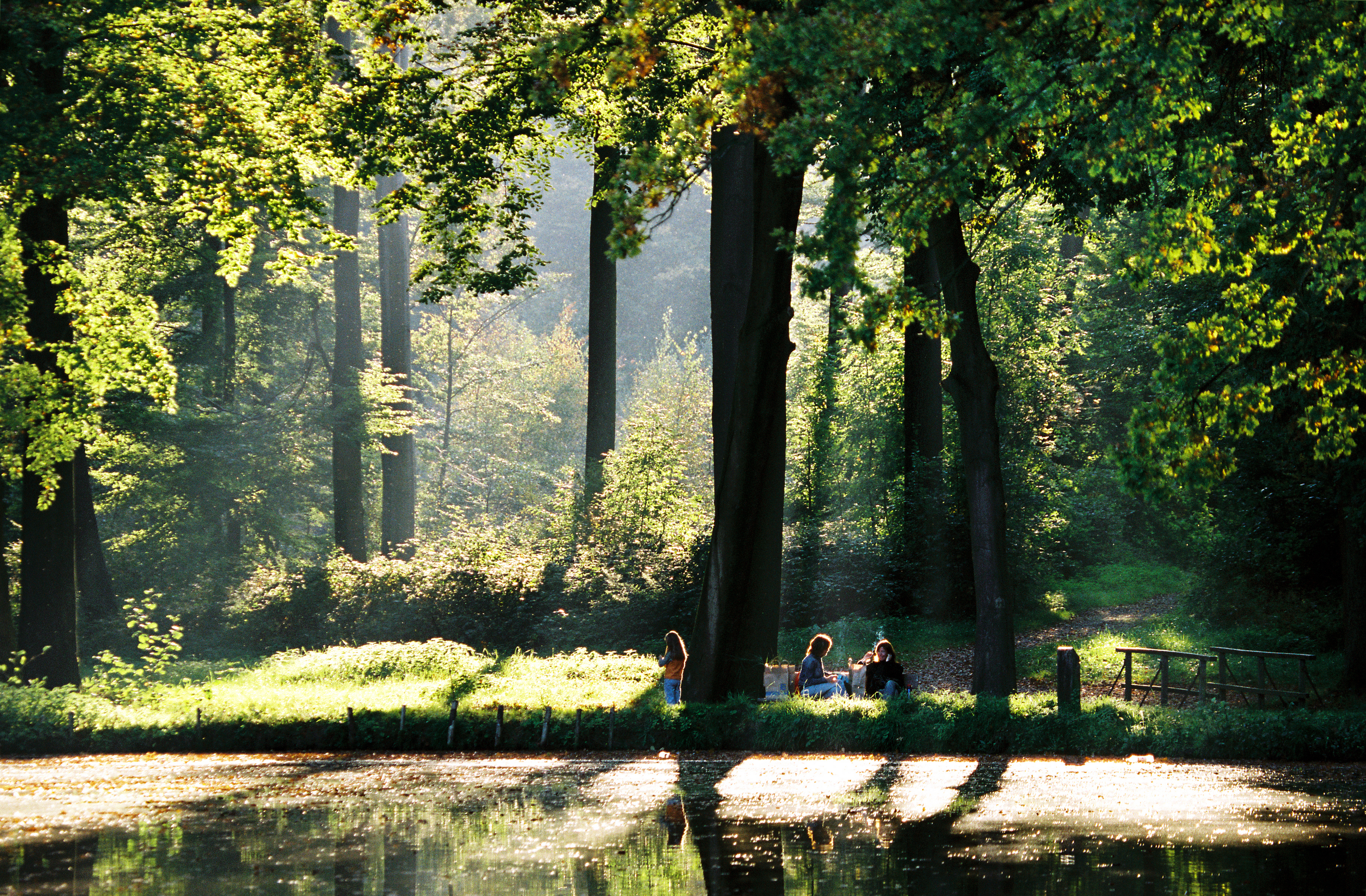 Waldidylle: Ein Foto mittels "langer Brennweite" (Fernobjektiv) fotografiert über den "Langen Teich" hinweg, inmitten des Renaissance-Tiergartens Schloss Raesfeld". Teil des Naturparks "Hohe Mark", im südwestlich gelegenen Münsterland.